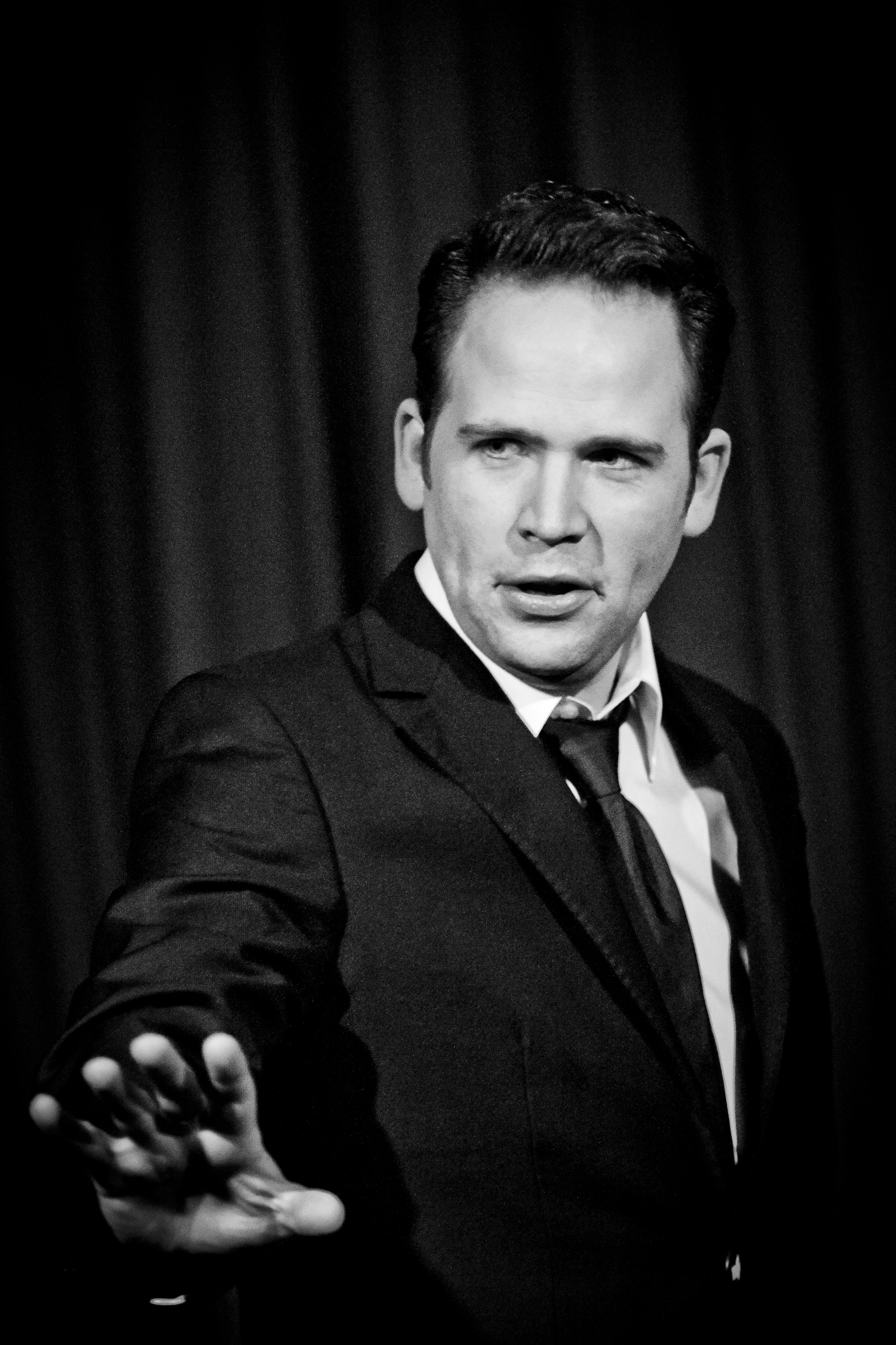 Christoph Tiemann 2012 in seinem Solo-Programm "Kabarettverbot"